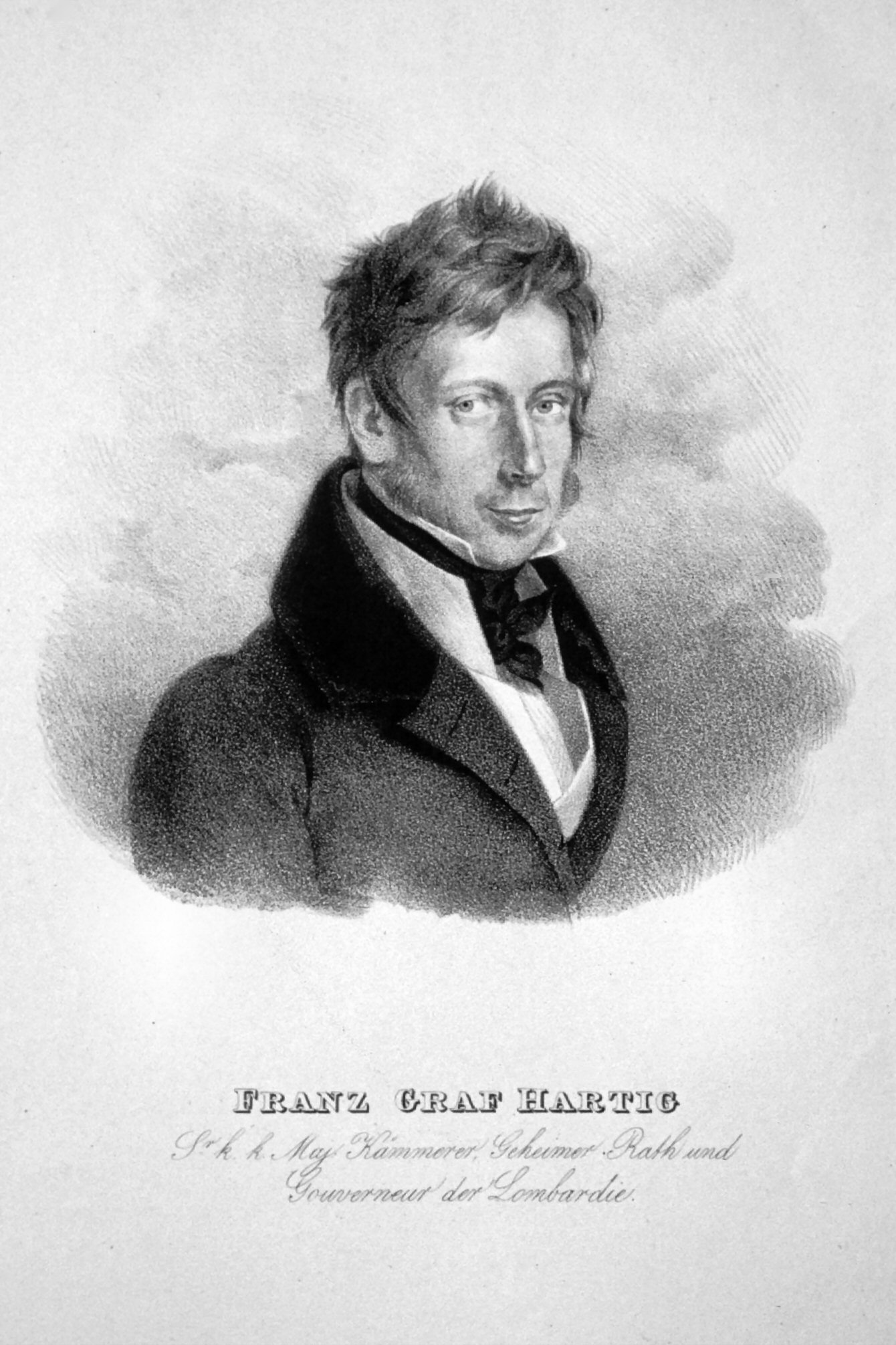 Franz von Hartig, anonyme Porträtlithographie, s.a.